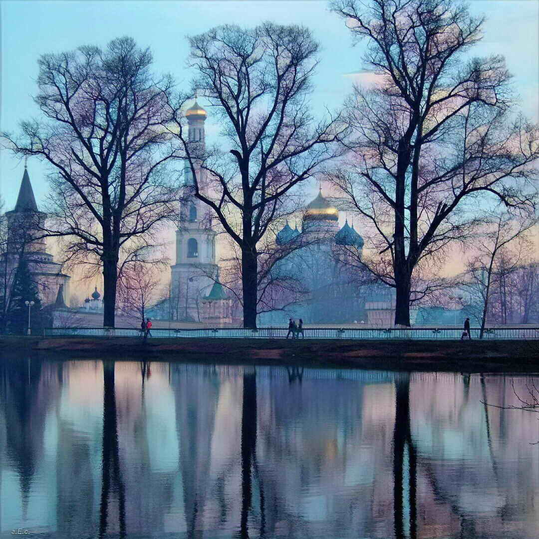 Ugreshi Monastery